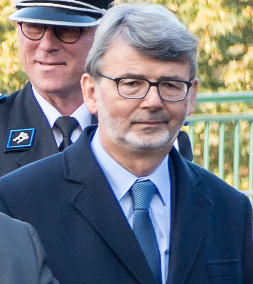 D'Journée de la commémoration nationale erënnert un d'Lutte vum Lëtzebuerger Vollek géint d'Nazi-Okkupatioun am Zweete Weltkrich. D'Commemoratioun ass am Oktober, um Sonnden deen am notse beim 10. Oktober läit. Se erënnert domat un den Echec vun der Personenstandsaufnahme vum 10. Oktober 1941. Feierlechkeete ginn a ville Gemengen ofgehal, an der Stad Lëtzebuerg sinn et der gläich dräi: Beim Nationalmonument vun der Lëtzebuerger Solidaritéit um Kanounenhiwwel, bei der Gëlle Fra op der Constitutiounsplaz a beim Hinzerter Kräiz um Nikloskierfecht. Um Kanounenhiwwel huet de Grand-duc den 9. Oktober 2016 e Kranz néierleeë gelooss an d'Erënnerungsflam vrum Monument raniméiert. No der Heemecht huet hien zesumme mam Chamberpresident, dem Premier an der Stater Buergermeeschtesch d'Monument besicht. Mat der Begréissung vun de Fändeldréier, de Vertrieder vun de patrioteschen Organisatiounen a vun den Holocaust-Affer, den auslänneschen Ambassadeuren, den Autoritéite vu Staat a Gesellschaft an och de Studente vum Stater Kolléisch an der Universitéit goung d'Zeremonie hei zu Enn. Den Deputéierte Roger Negri.